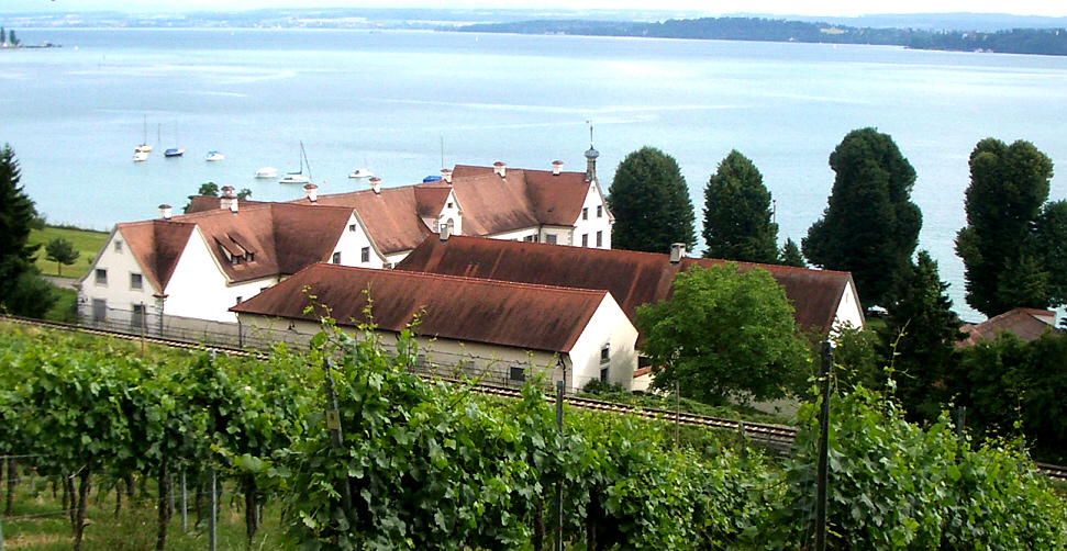 Birnau, Germany: Schloss Maurach